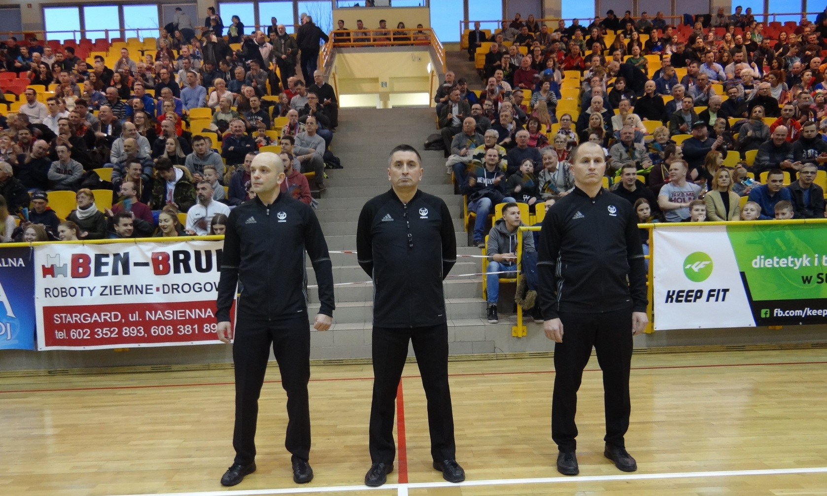 Sędziowie meczu Spójnia Siarka, 3 marzec 2018